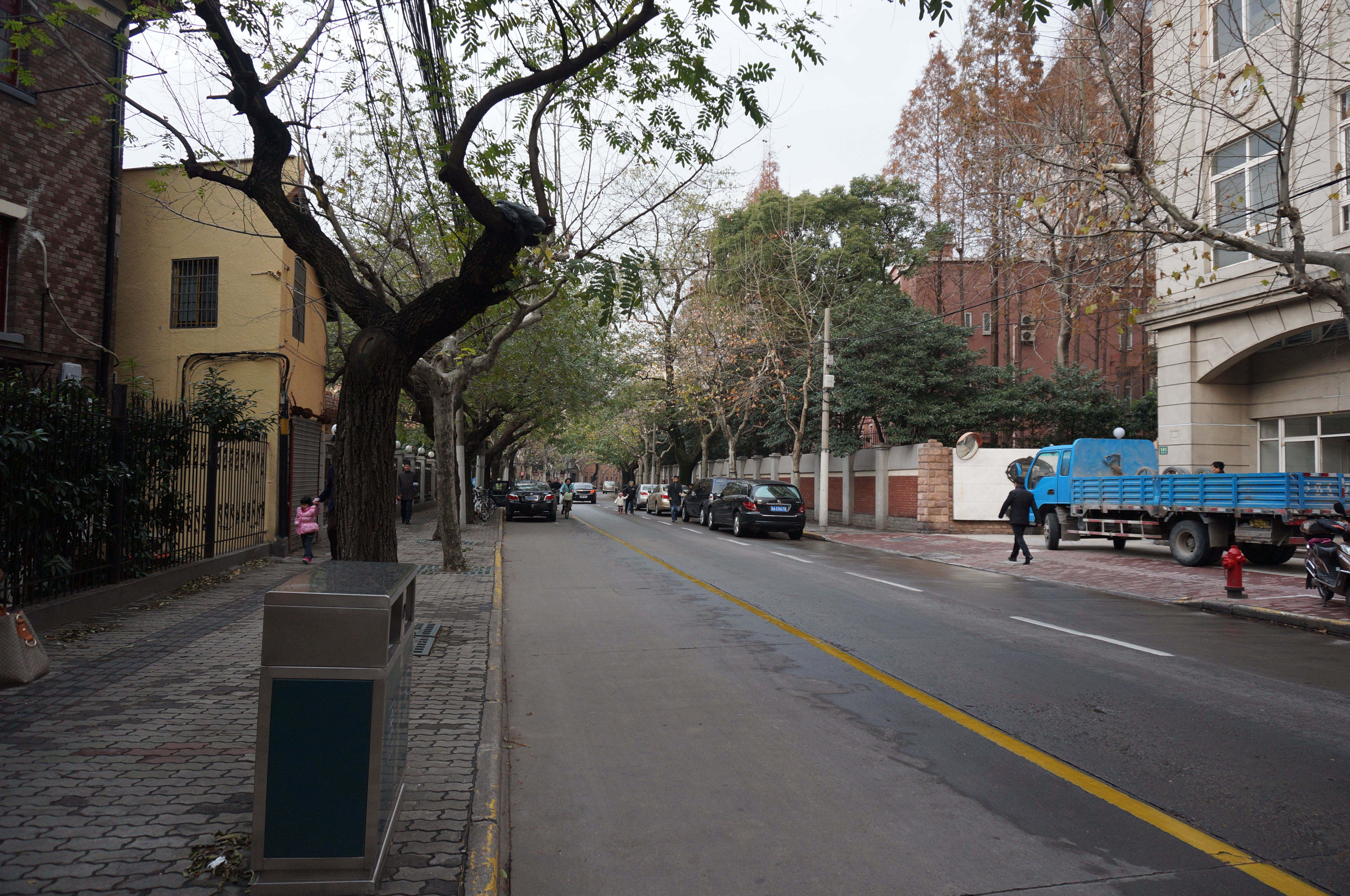 建国西路街景